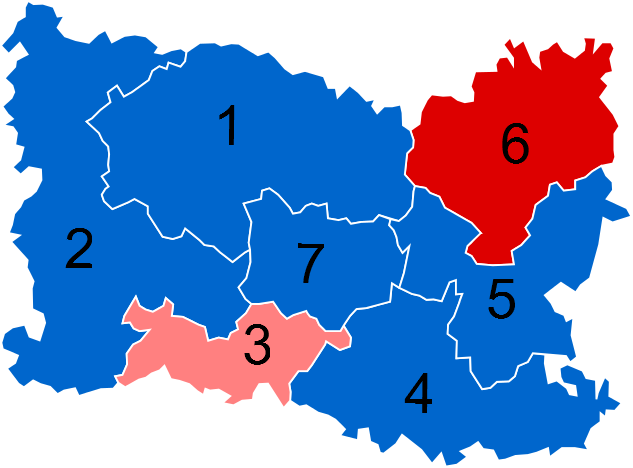 Résultats des élections législatives de l'Oise en 2012